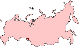 Locatie binnen Rusland van de stad Omsk